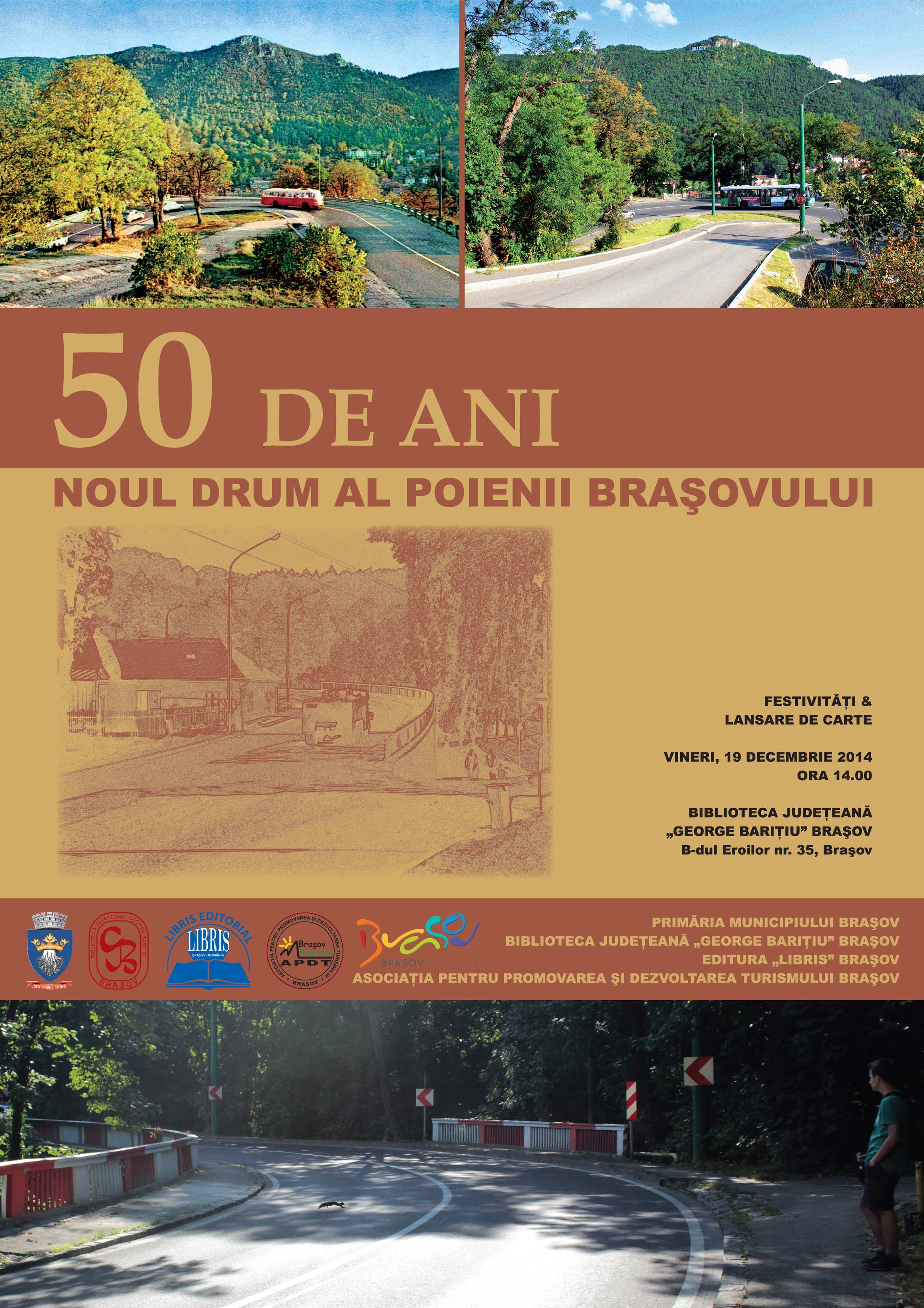 Afiş eveniment "50 de ani de la inaugurarea Drumului de Poiană - 2014"